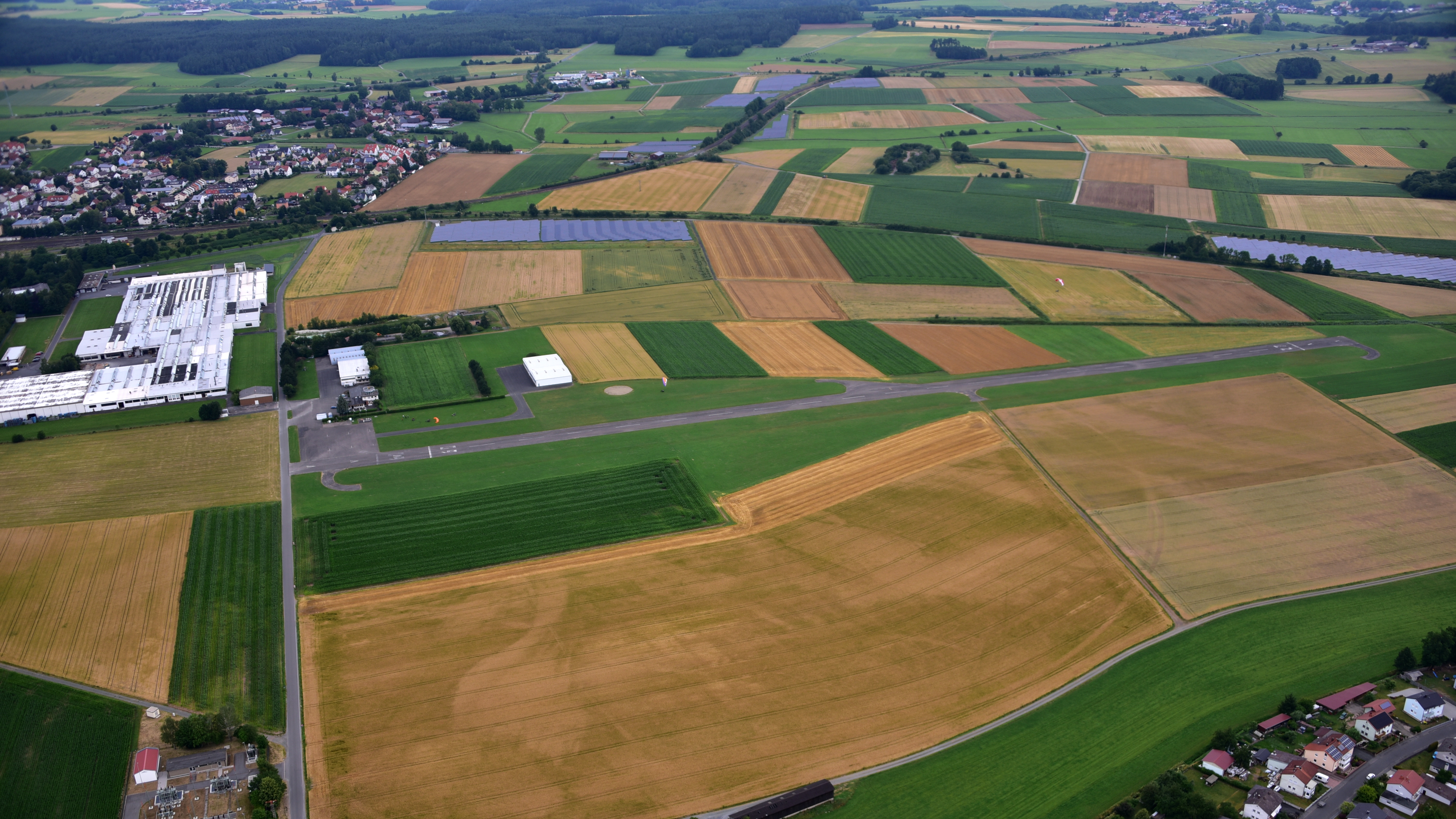 Flugplatz Rosenthal-Field-Plössen, Luftaufnahme (2016)